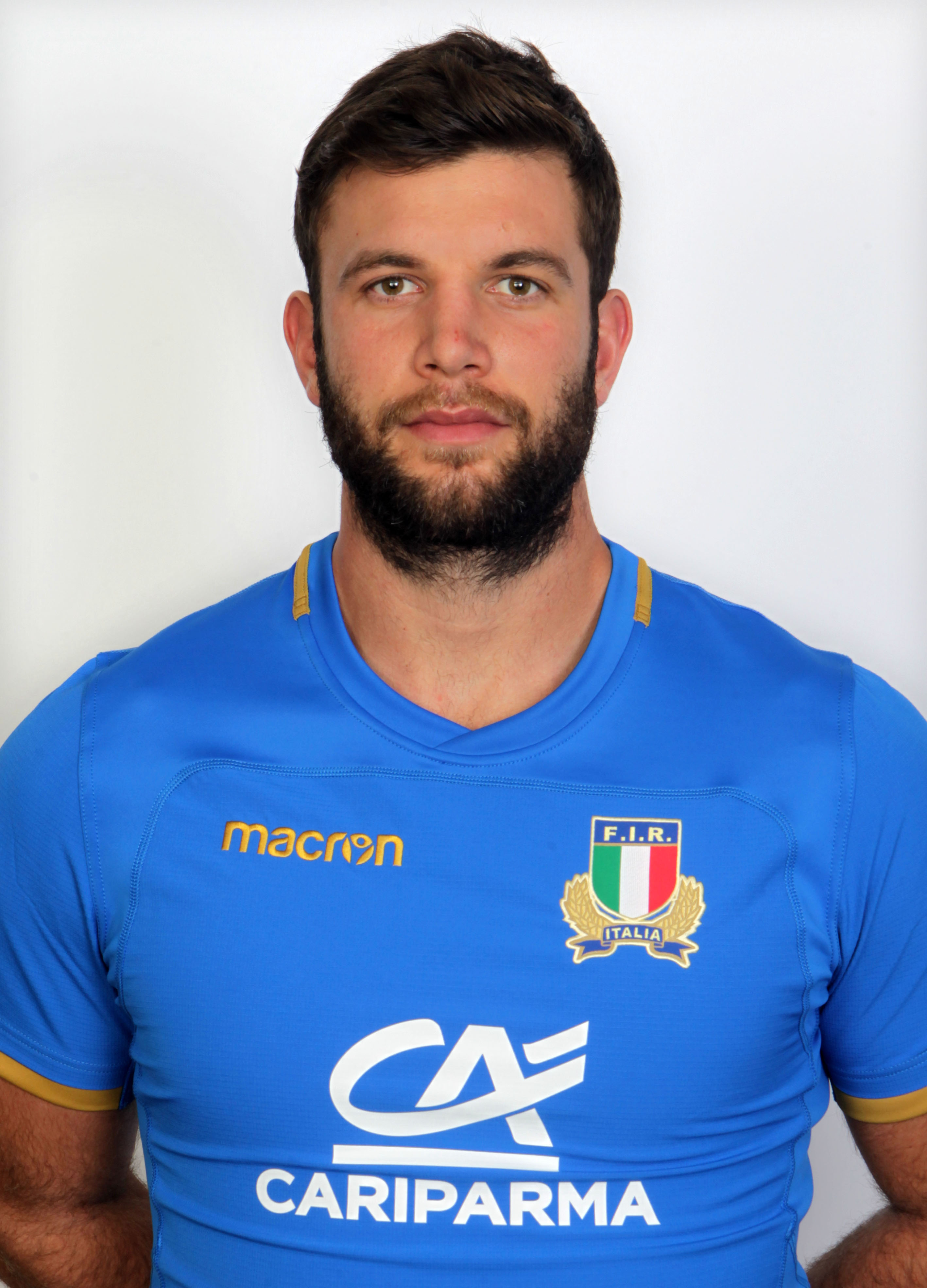 Cariparma Test match 2017, Parma 22/10/2017, raduno Nazionale italiana, profili individuali di atleti e staff, Marco FUSER seconda linea (Benetton Rugby, 24 caps).